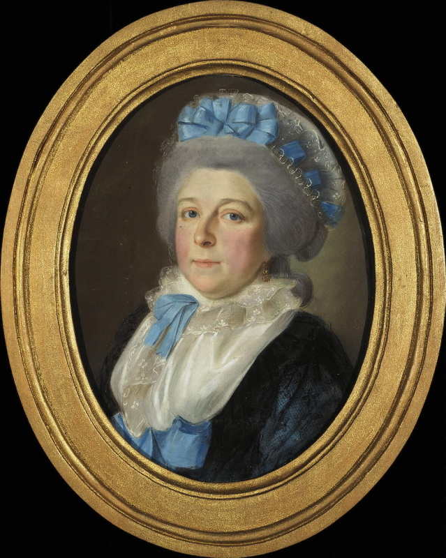 Княгиня Надежда Ивановна Голицына (1727-1811), ур.Вихляева, в 1-м браке за Василием Никитичем Грушецким (1717-1787), с 1787 года замужем за Иваном Фёдоровичем Голицыным (1731-1797).